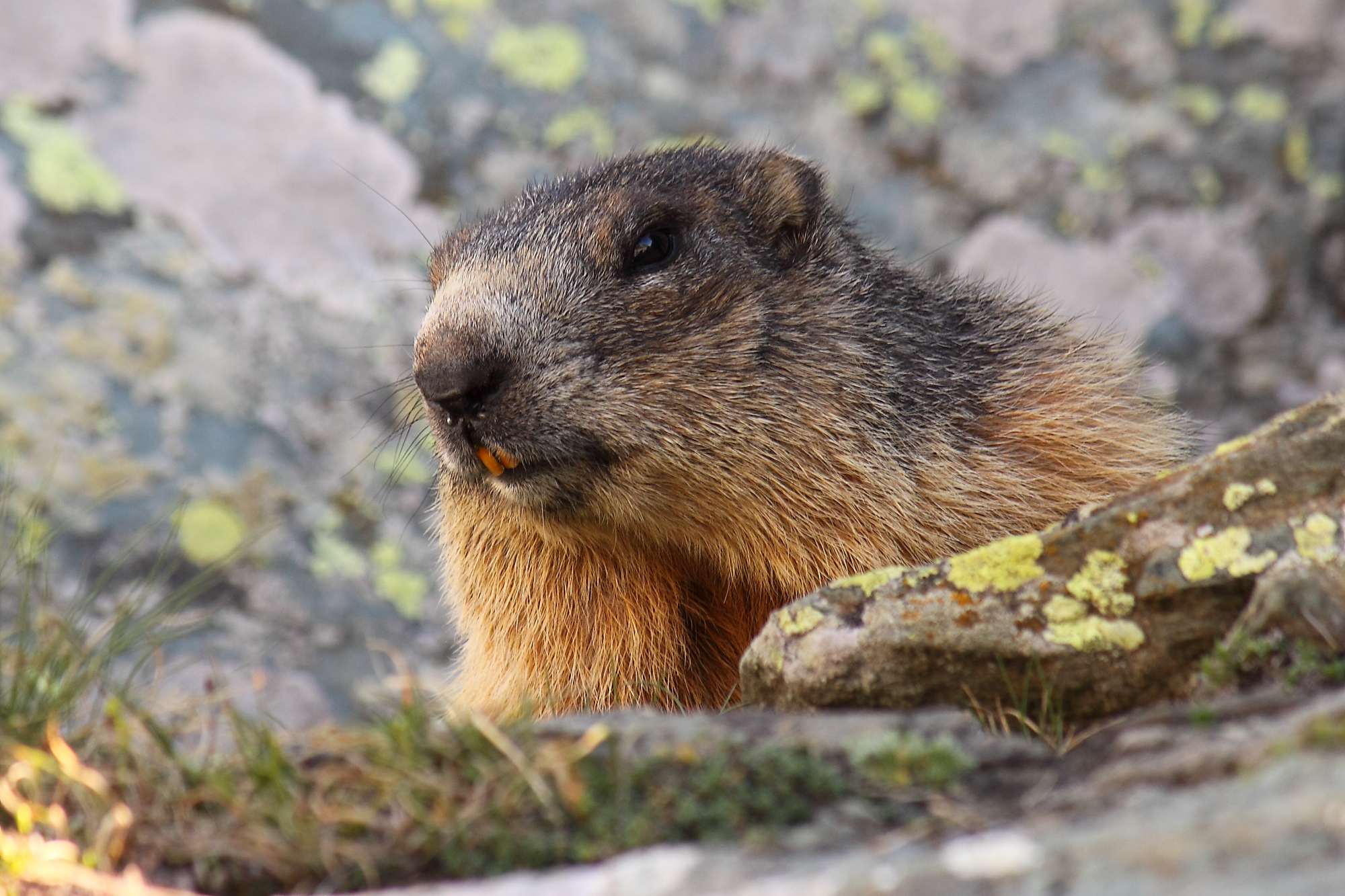 Alpski svizec. Veliki Klek. Avstrija.